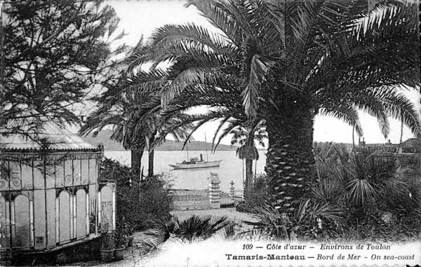 Parc exotique du Manteau au début du 20e siècle à Tamaris